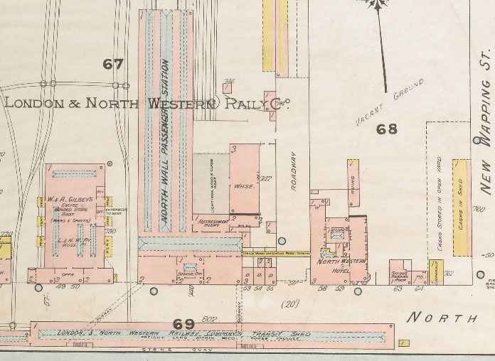 NorthWesternHotel Map 1893